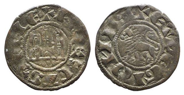 Pepión de Fernando IV de Castilla y de León. En el anverso figura un castillo rodeado de la leyenda F REX CASTELLE; en el reverso un león con la leyenda ET LEGIONIS.